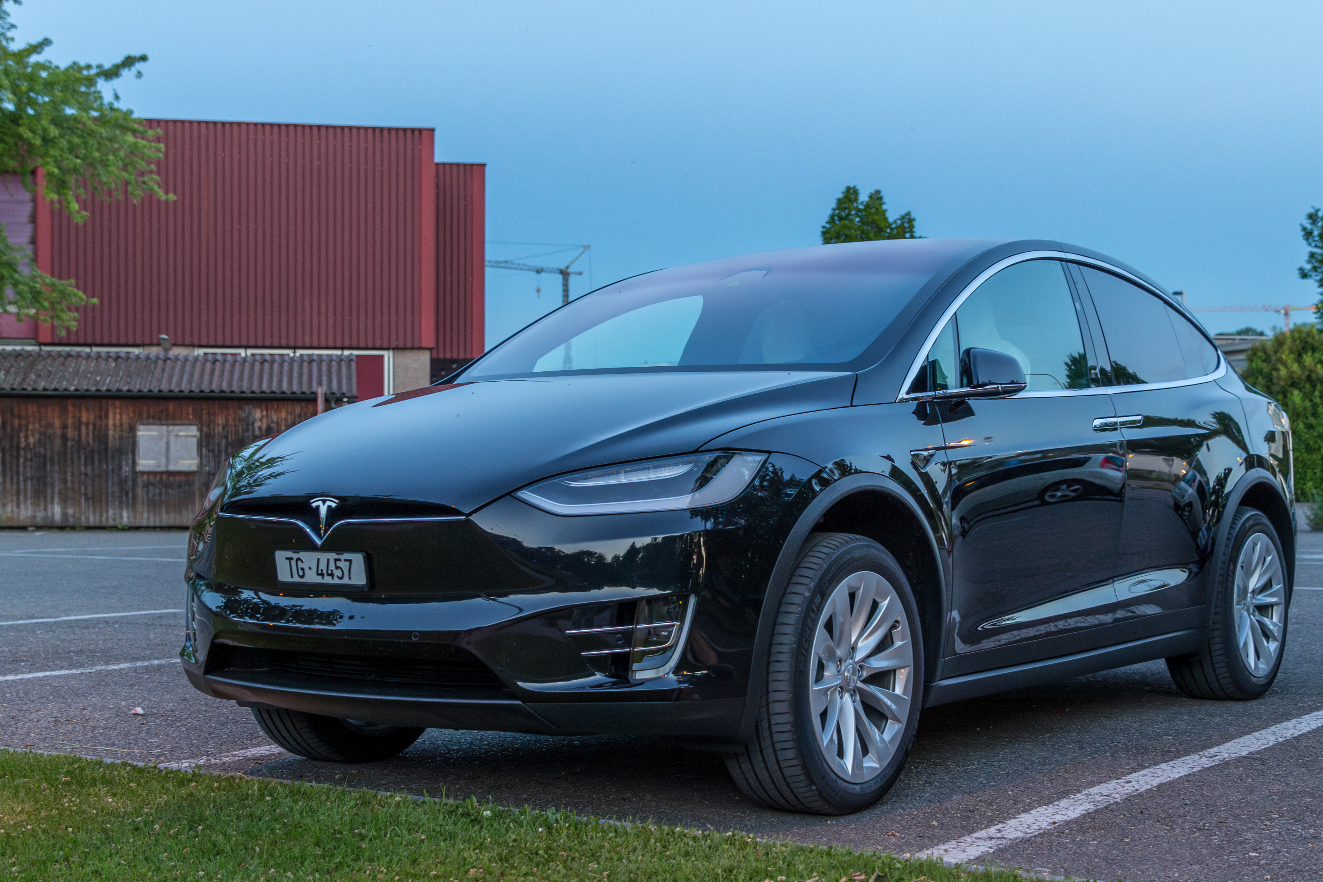 Tesla Model X 90D Frontansicht